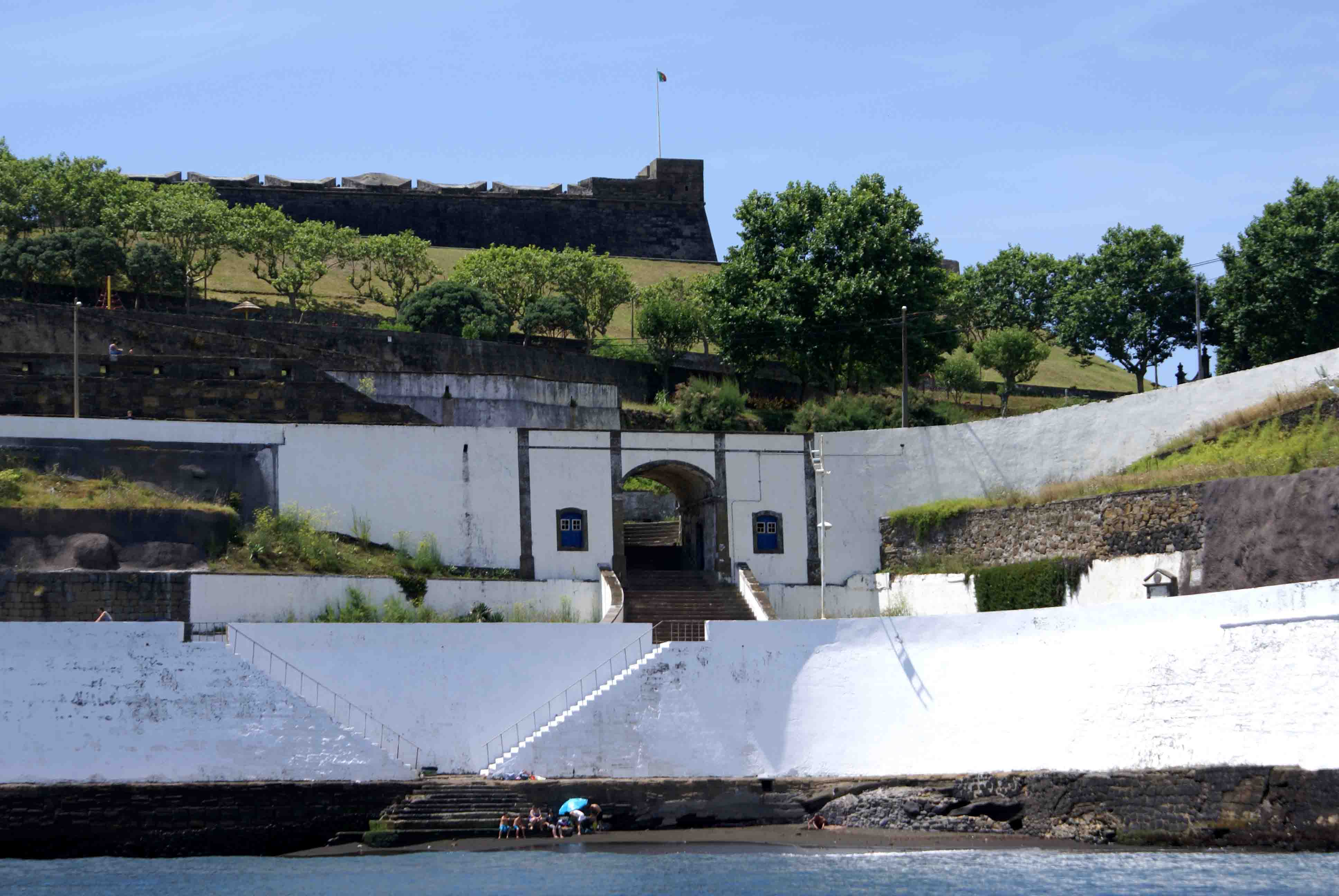 Portas da Prata, Angra do Heroísmo, ilha Terceira, Açores, Portugal